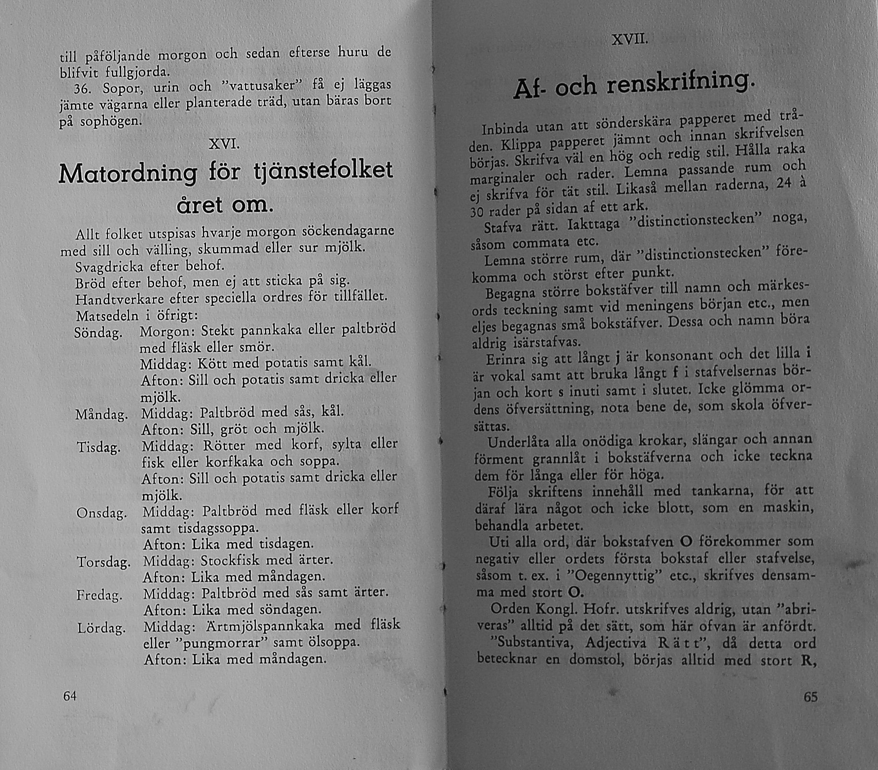 Muhrs brukskatekes med matordningen för tjänstefolket, som utgavs första gången 1892.